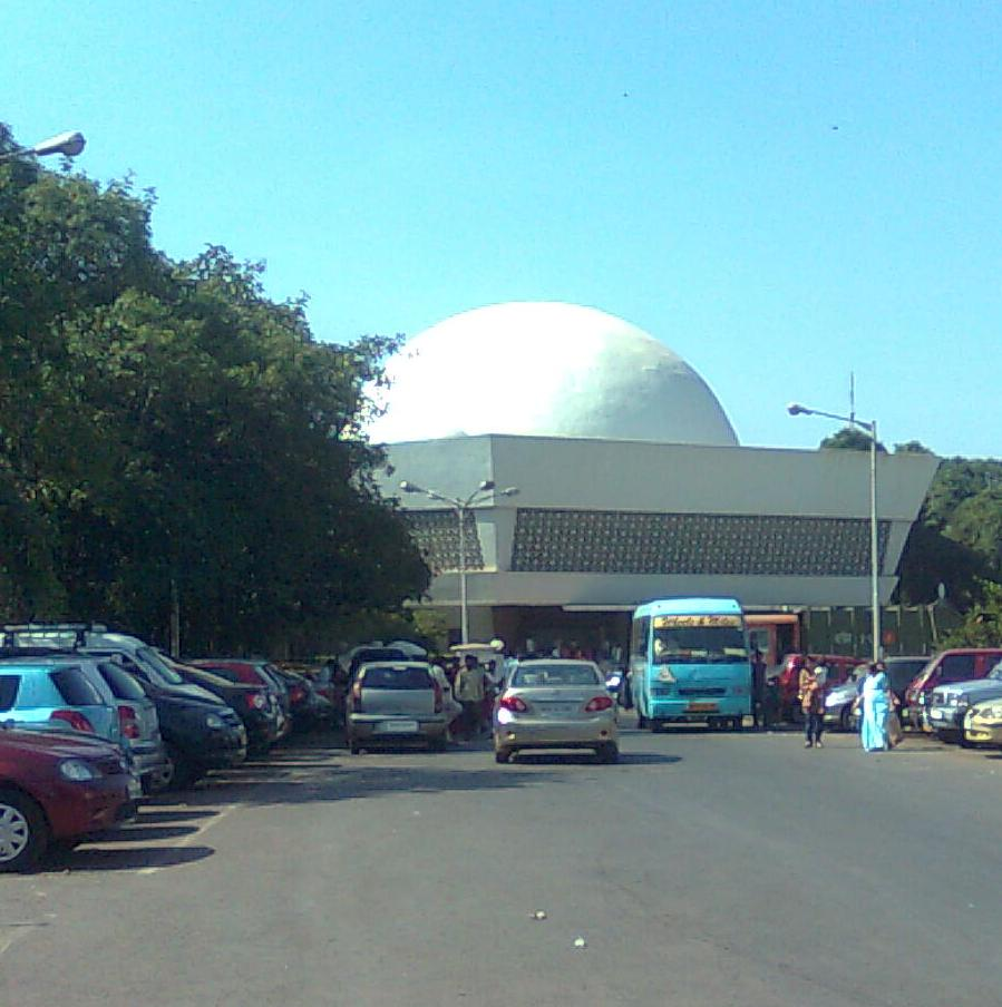 नेहरु सेन्टर